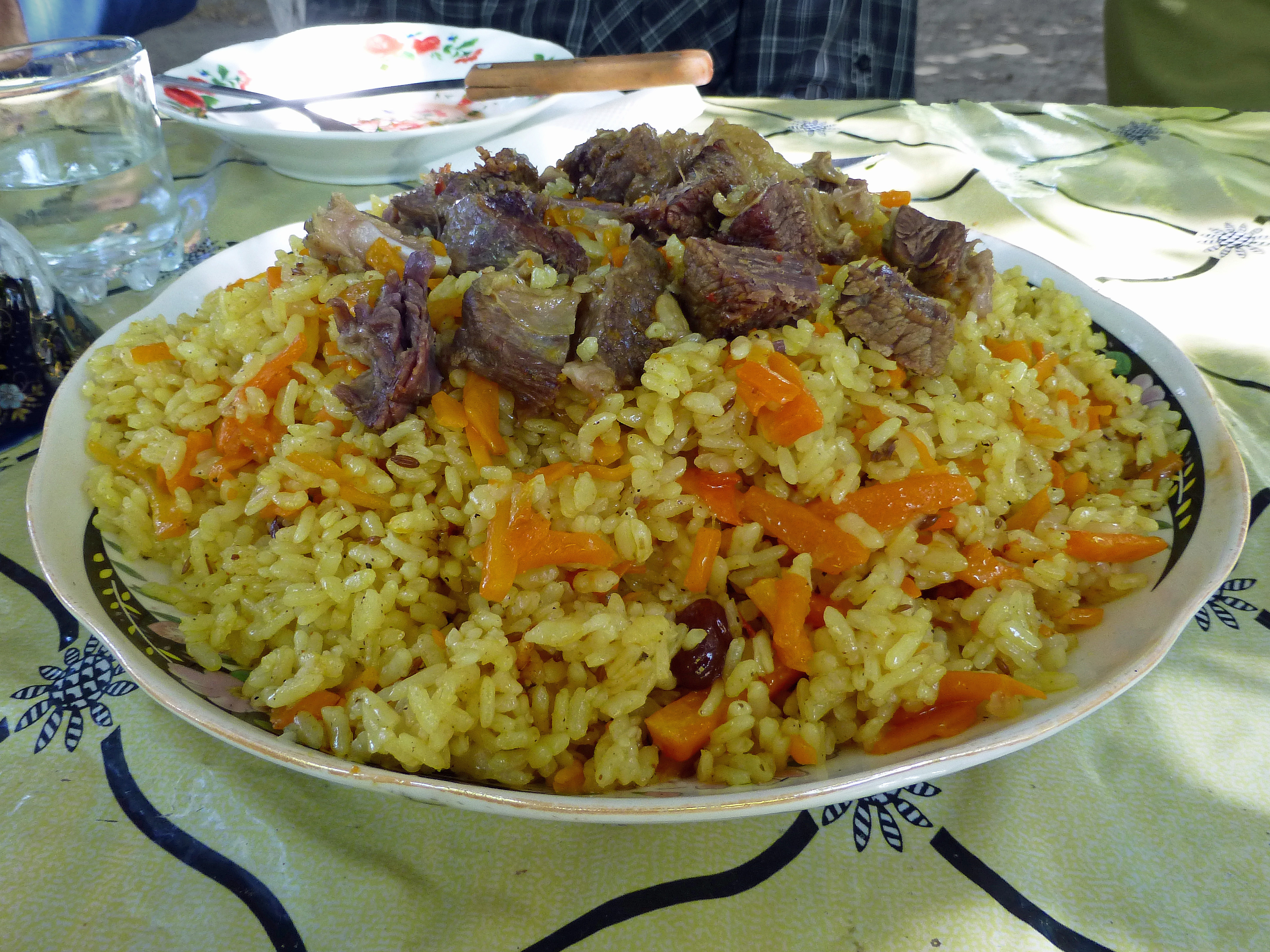 Du plov, plat national ouzbek, à Urazmat (Ouzbékistan)